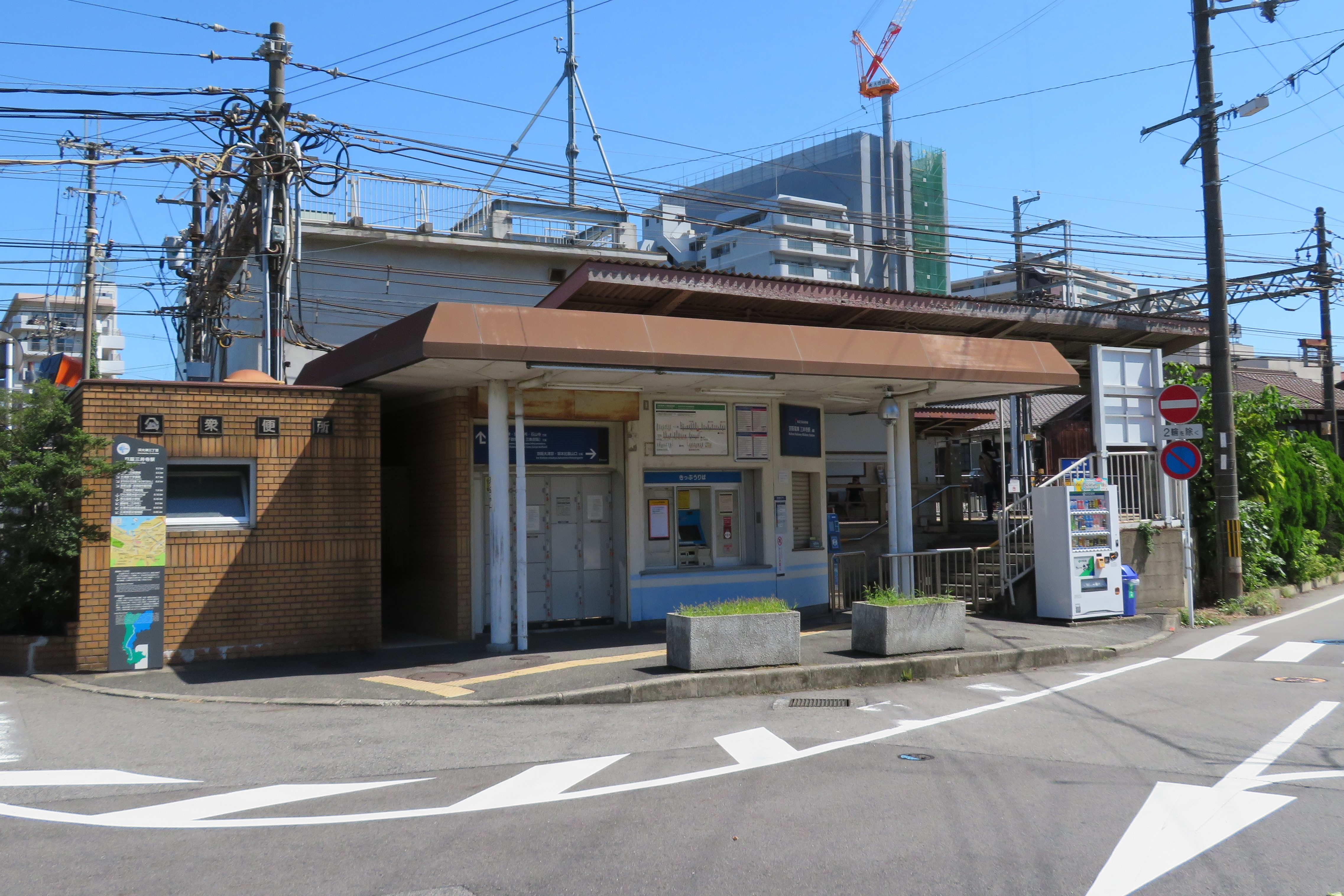 京阪電鉄三井寺駅